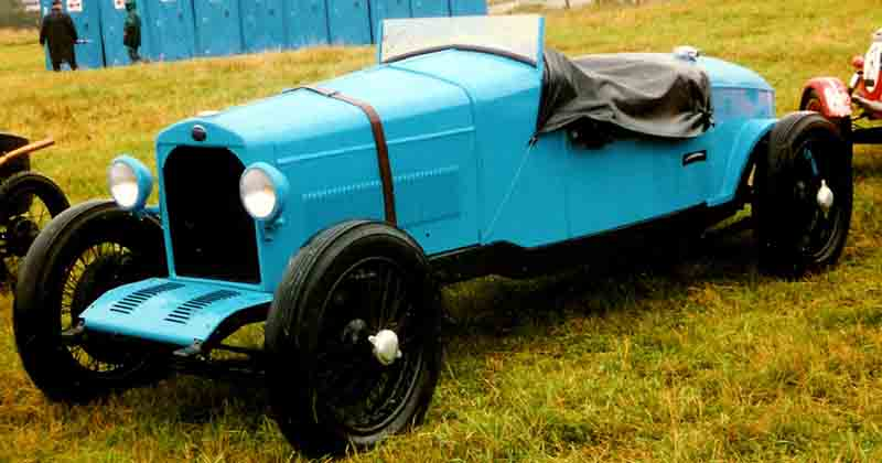 Delage DR70 Racer 1925